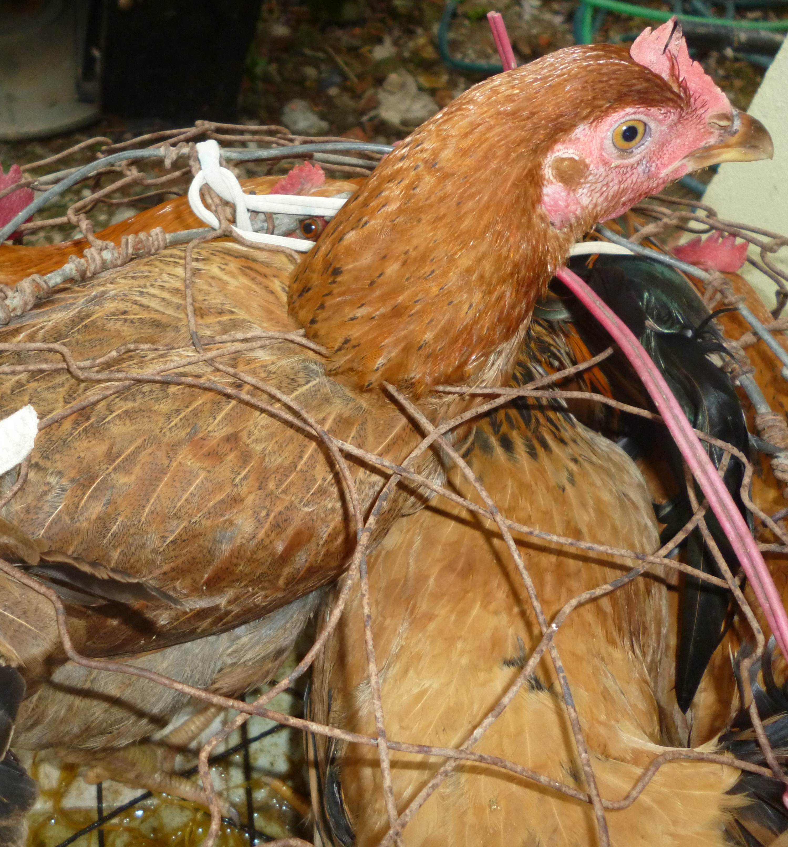 Hình chụp một con gà thuộc giống gà Mía bằng máy ảnh cá nhân